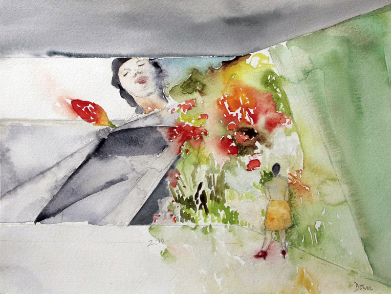 Serie pintando la imagen-movimiento